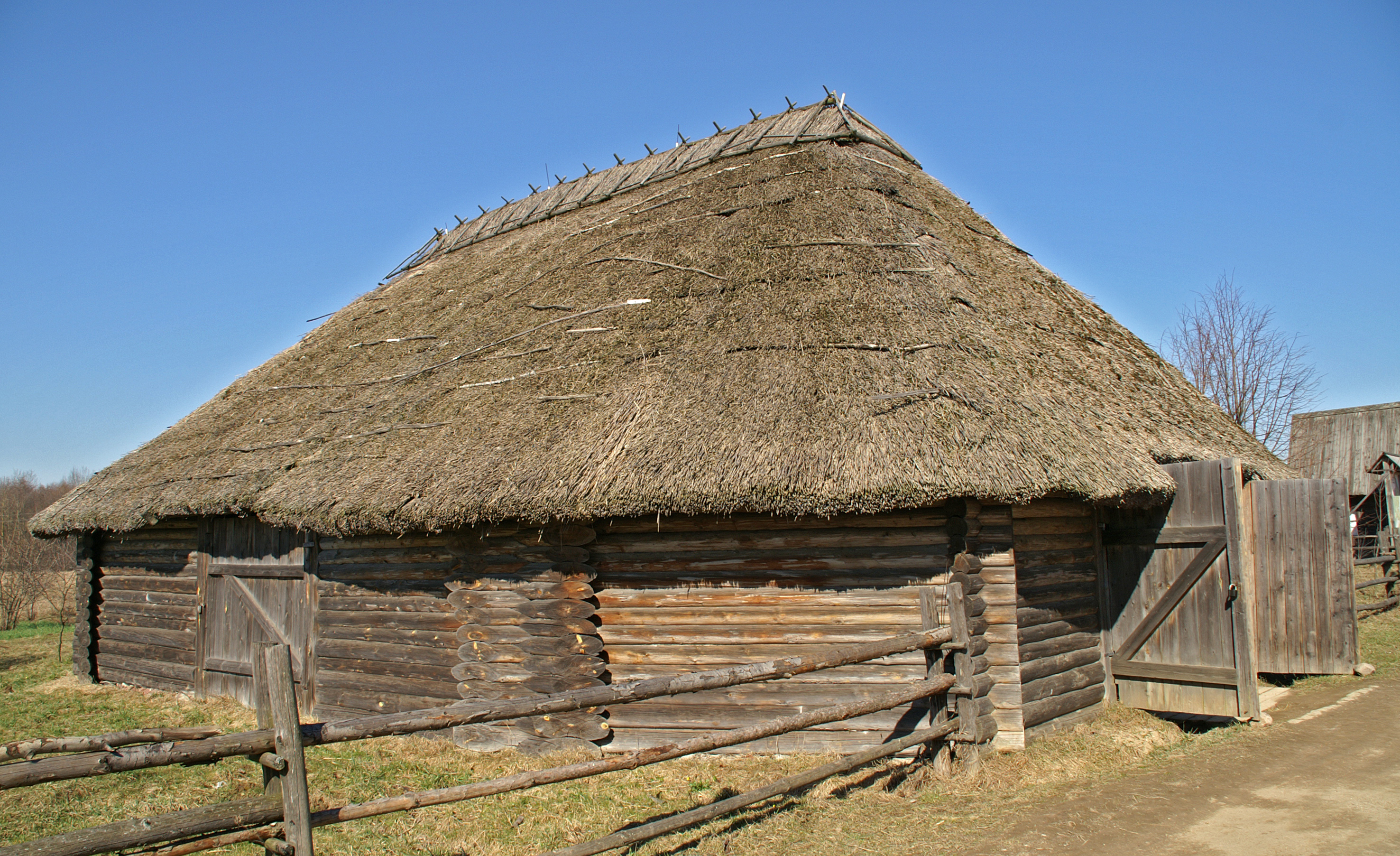 Беларуская (тарашкевіца): Гумно зь в. Лучнікі Слуцкага раёну Менскай вобласьці. в. Азярцо This is a photo of Belarusian heritage monument. Reference number: 612Г000386 ( WLM)